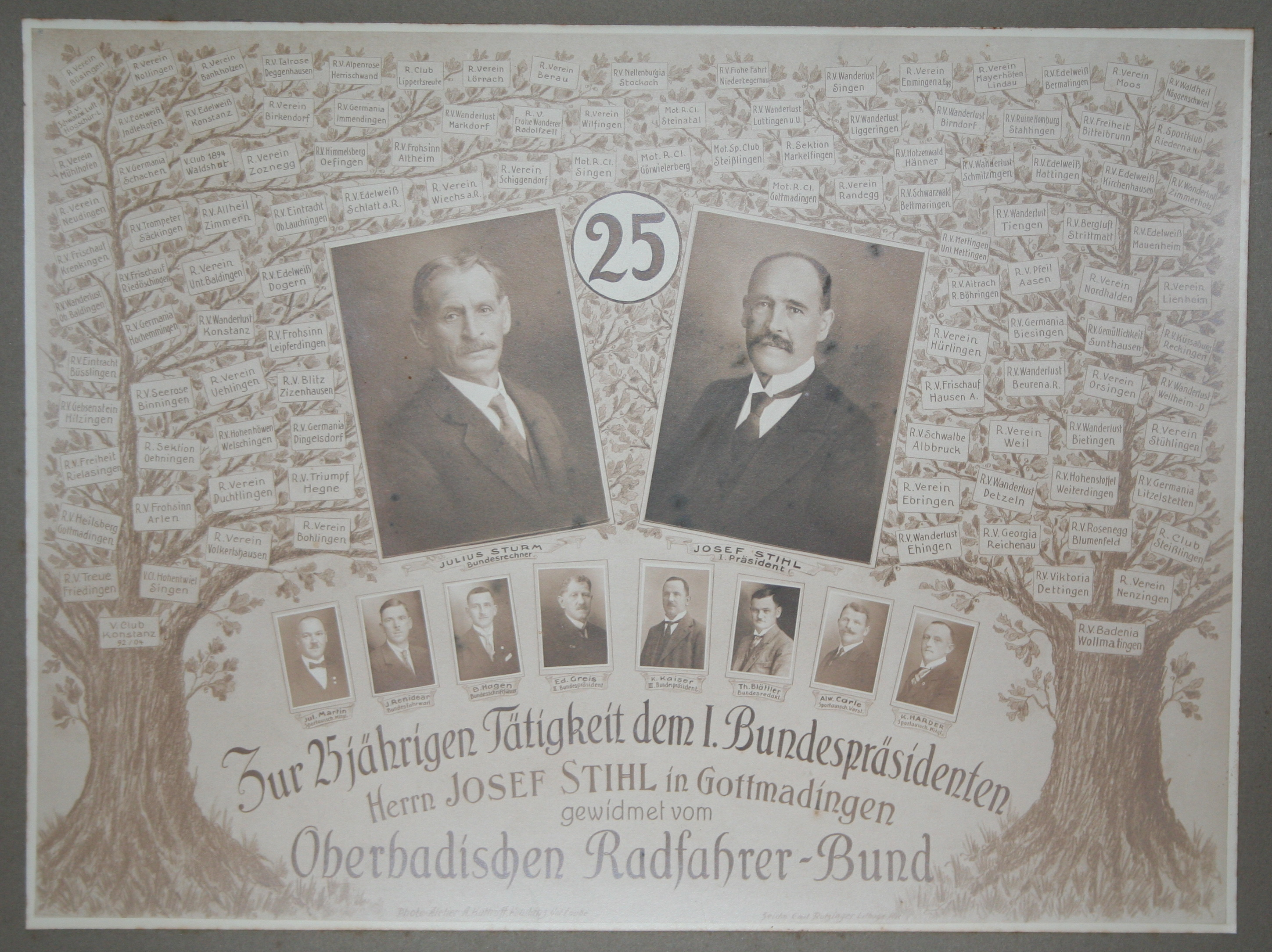 Liste der Mitgliedsvereine und Vorstandsmitglieder des Oberbadischen Radfahrer-Bundes, anlässlich des 25-jährigen Amtsjubiläums des 1. Vorsitzenden Josef Stihl. Die Aufnahme stammt von Anfang der dreißiger Jahre: der 1904 gegründete Bund konnte frühestens 1929 ein 25-jähriges Jubiläum feiern, 1933 wurde er im Rahmen der Gleichschaltung aufgelöst.